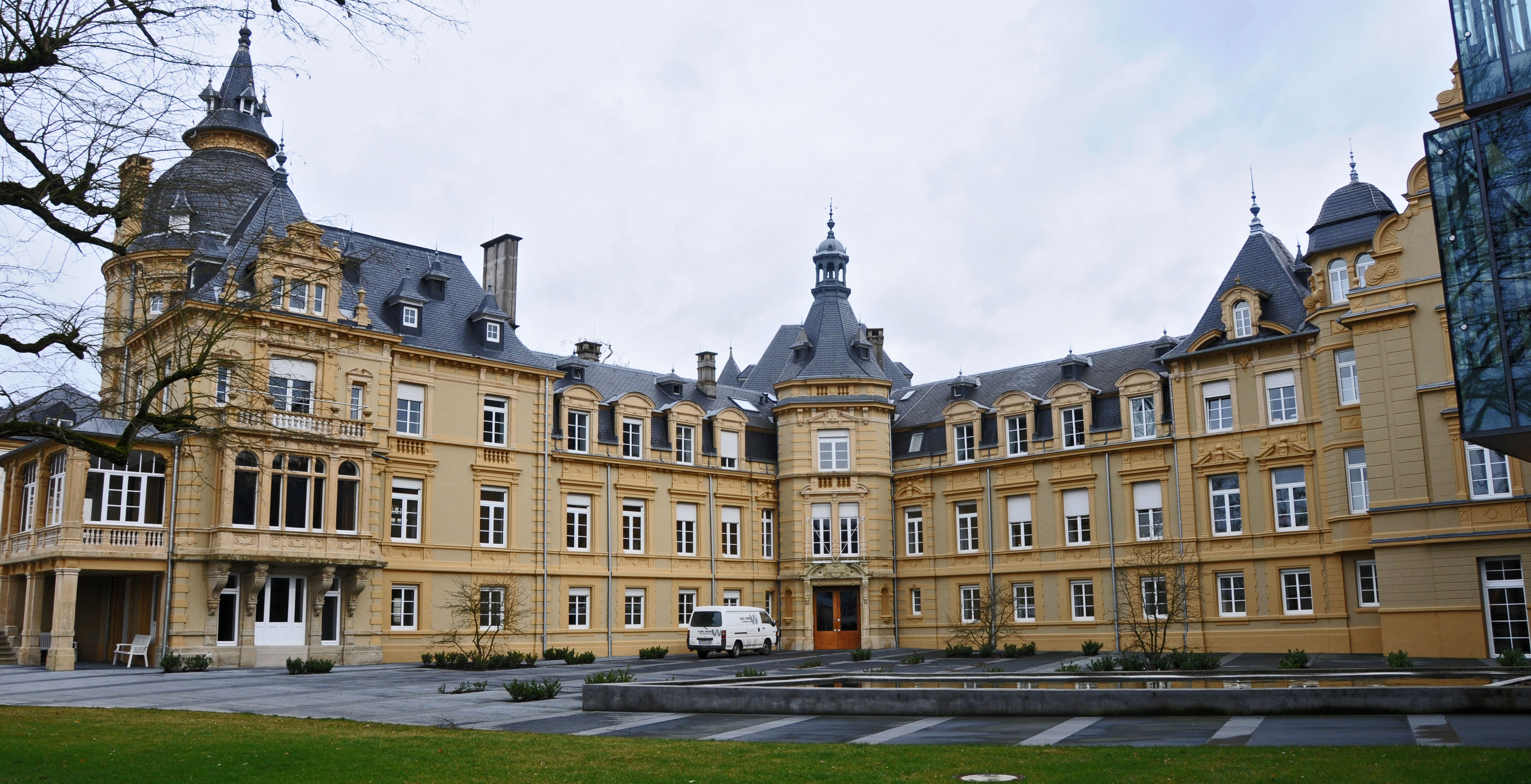 Le château de Heisdorf (Luxembourg)